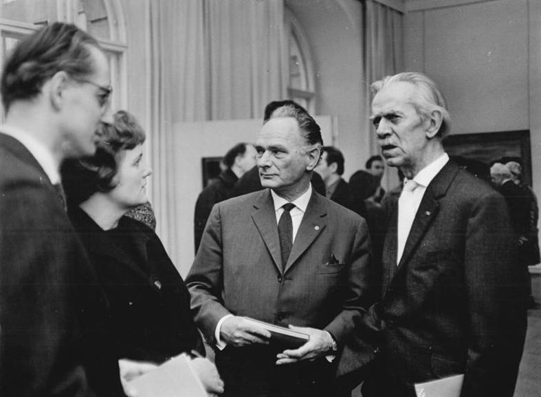 Berlin, Max Liebermann-Ausstellung, Deist, Bork, Nagel Zentralbild Franke 20.3.1965 Gemälde und Handzeichnungen von Max Liebermann werden seit dem 19.3.1963 in einer Kunstausstellung in den Räumen der Deutschen Akademie der Künste zu Berlin gezeigt. Nach der Eröffnung der Ausstellung im Gespräch (von rechts nach links) Otto Nagel, Vizepräsident der Deutschen Akademie der Künste zu Berlin, der die Ausstellung eröffnete, der Stellvertreter des Ministers für Kultur Kurt Bork und Dr. Peter Deist vom Kunstgeschichtlichen Institut der Humboldt-Universität mit Gattin. Mit der Eröffnung dieser Ausstellung wurde der Auftakt zu den Feierlichkeiten des 15jährigen Bestehens der Deutschen Akademie der Künste zu Berlin gegeben. Abgebildete Personen: Nagel, Otto Prof.: Maler, Präsident der Akademie der Künste (AdK), Nationalpreisträger, Vaterländischer Verdienstorden (VVO) in Gold, DDR (PND 118586300)